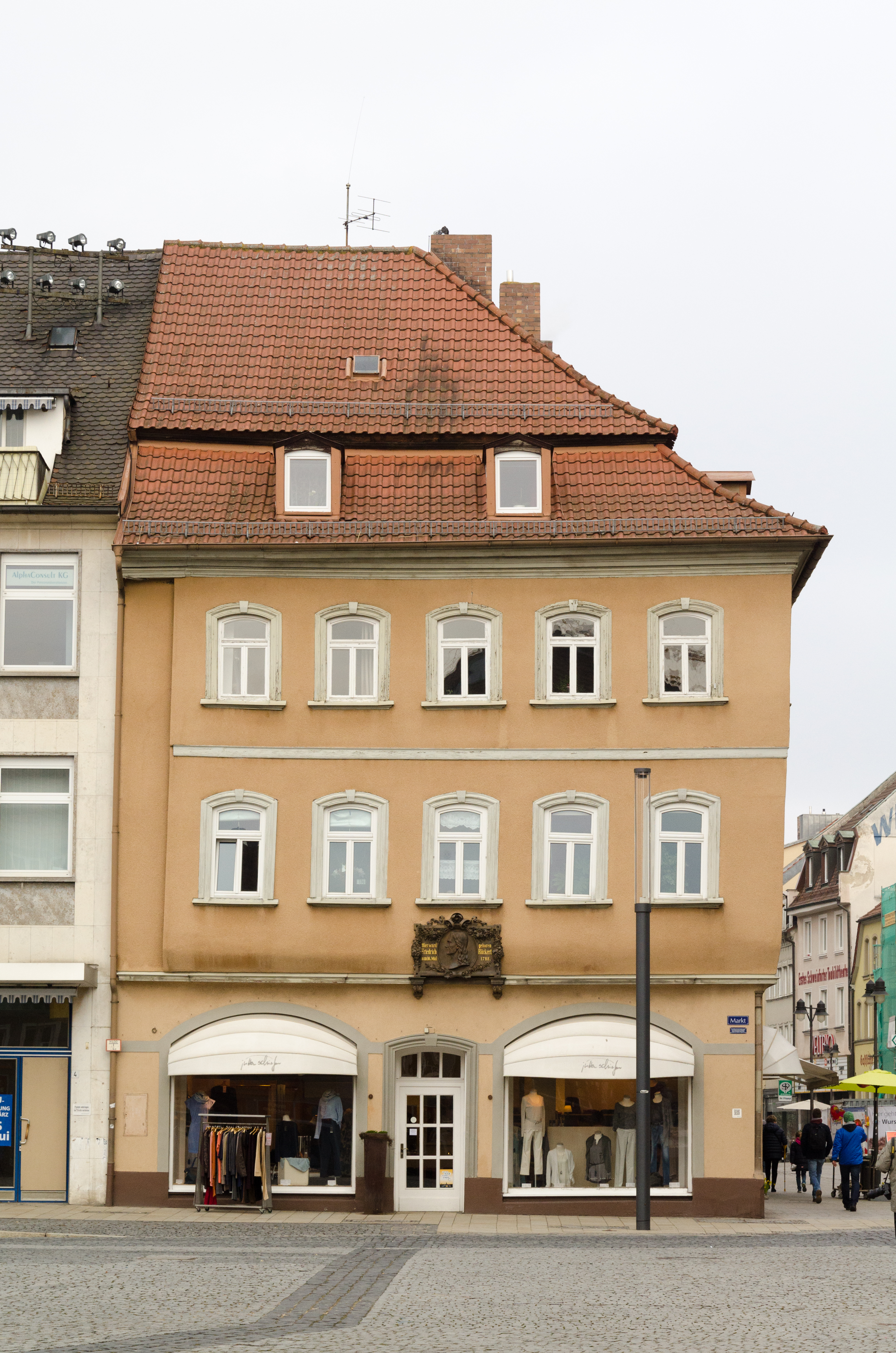 Schweinfurt, Markt 2